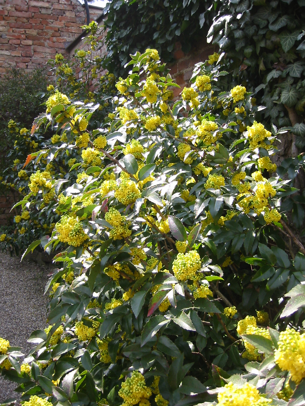 Berberidaceae_Mahonia_nervosa